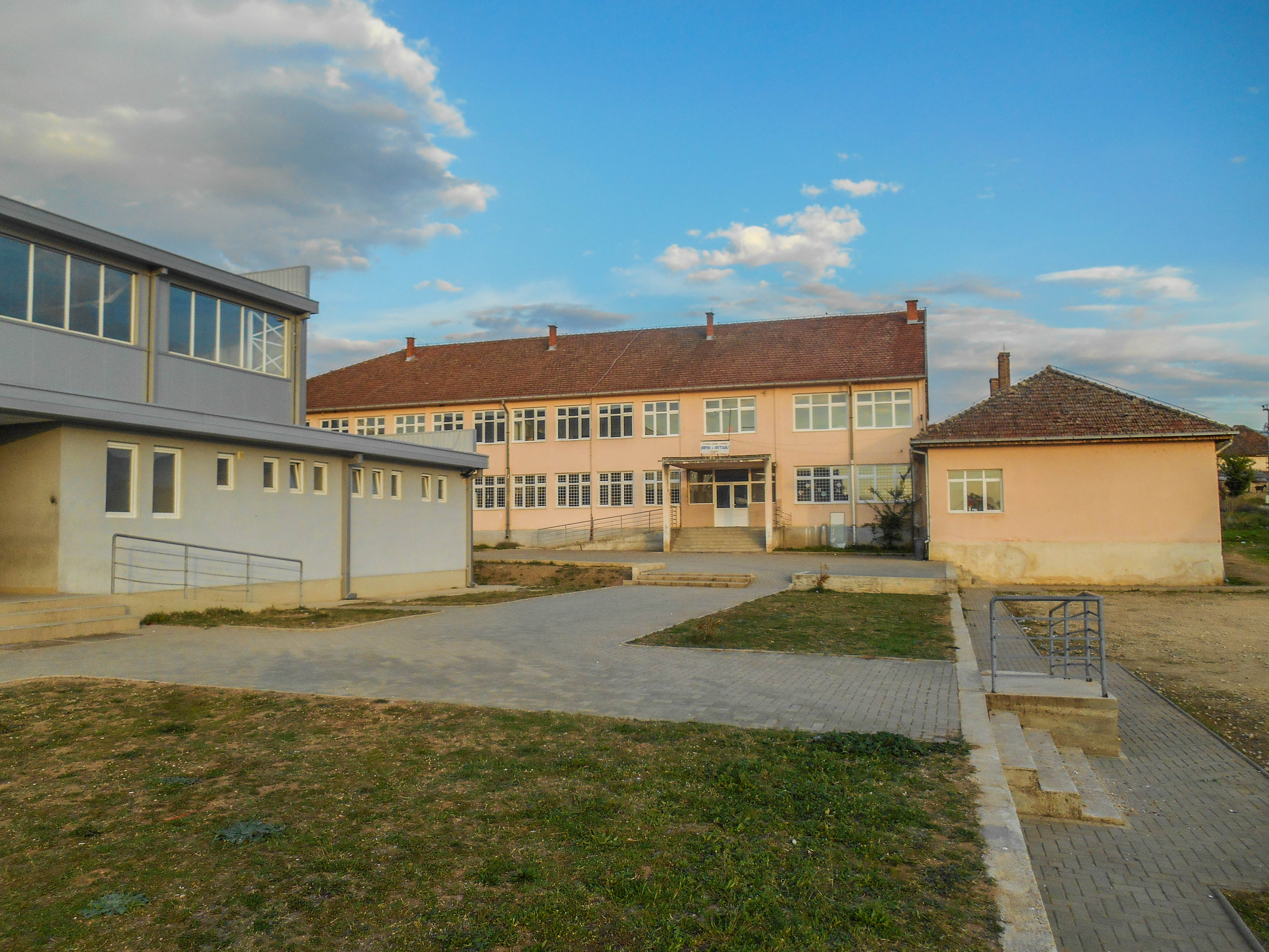 Основно училиште „Св. Кирил и Методиј“ - Иловица